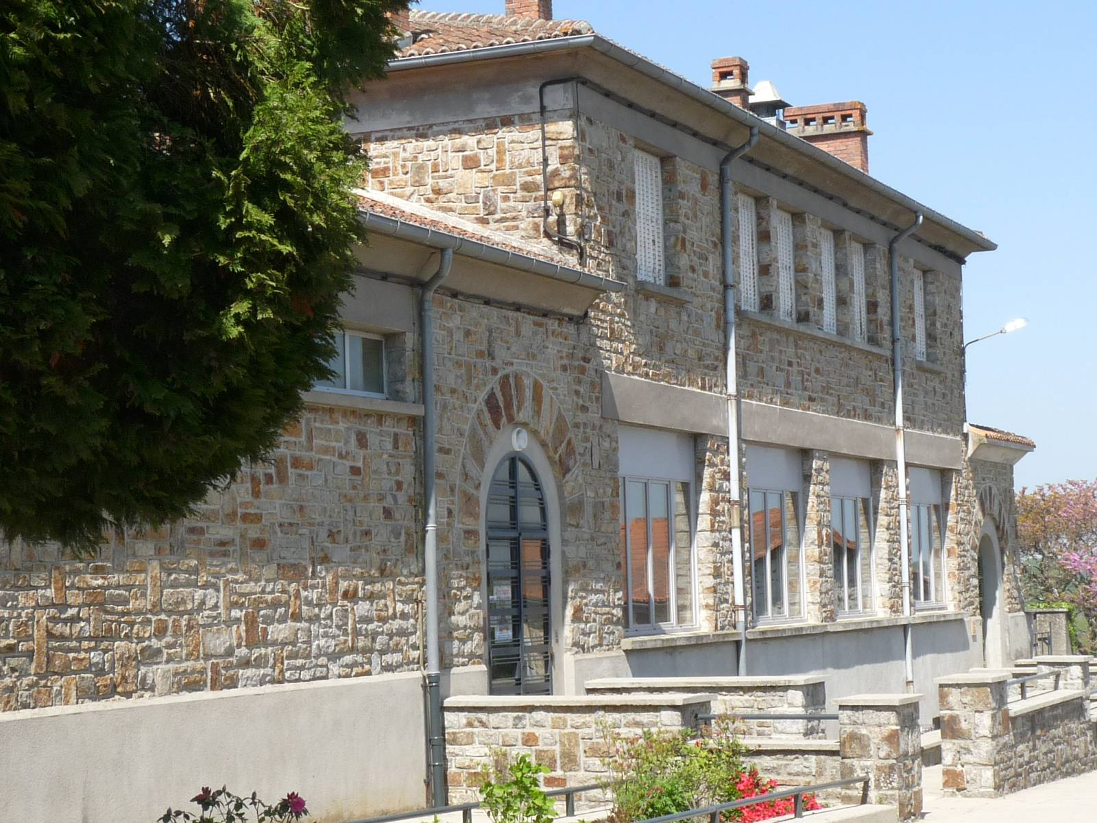 école d'Esse, Charente, France